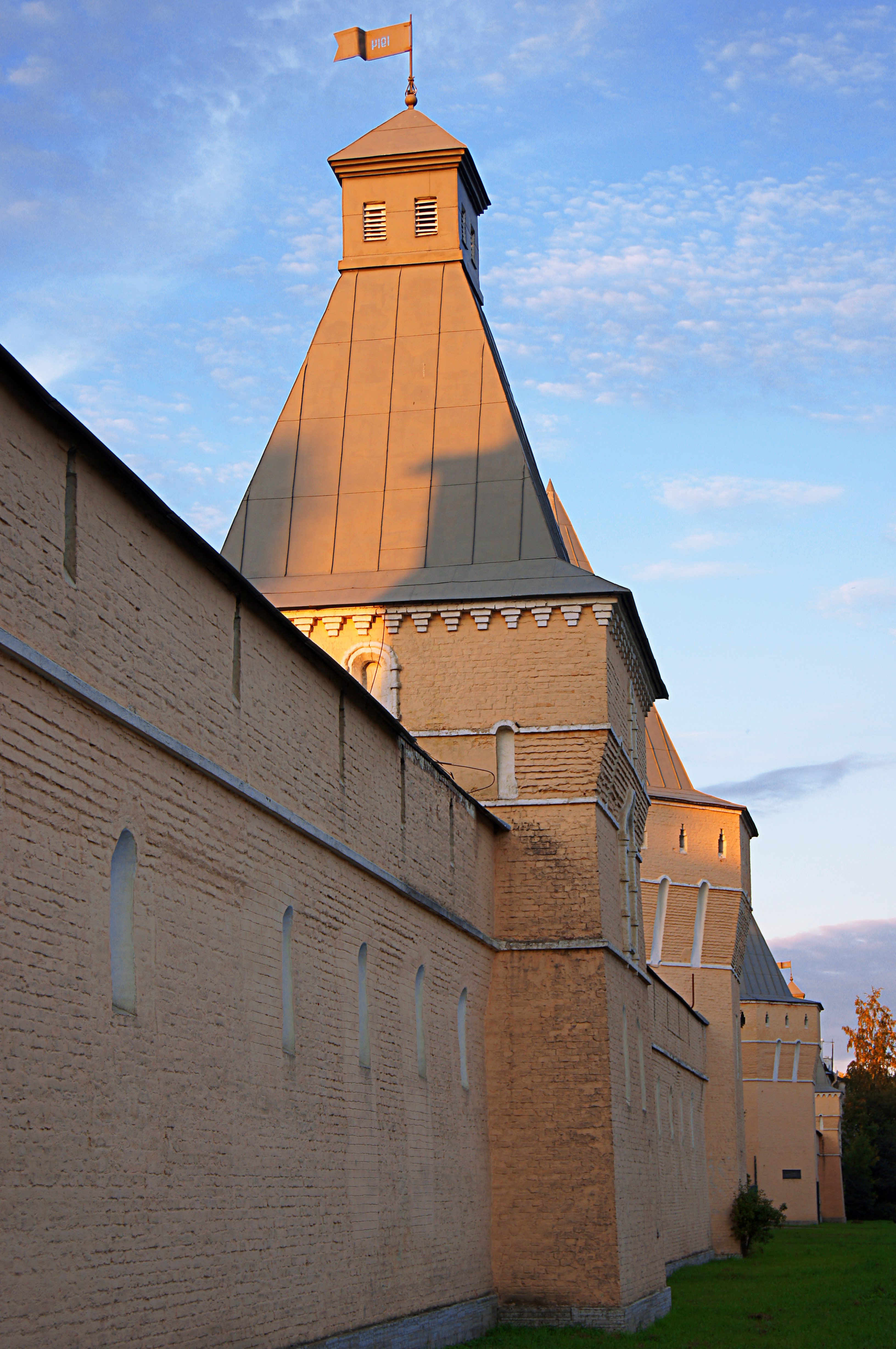 Казармы лейб-гвардии 3-го Стрелкового Его Императорского Величестваполка. Комплекс: Кадетский бульвар, 21, 23, улица Саперная, 22, 24, 30, Огородная улица, 6 (корп. 6/3, 6/12, 6/16, 6/17, 6/18, 6/19, 6/31, 6/32, 6/33, 6/47 и б/н, Пушкин, Пушкинский район, Санкт-Петербург